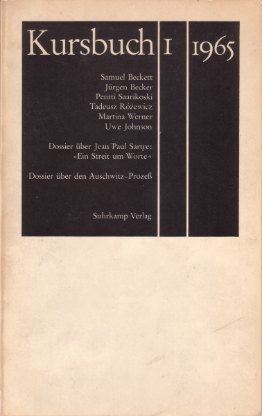 Cover des Kursbuchs, Heft 1, 1965.